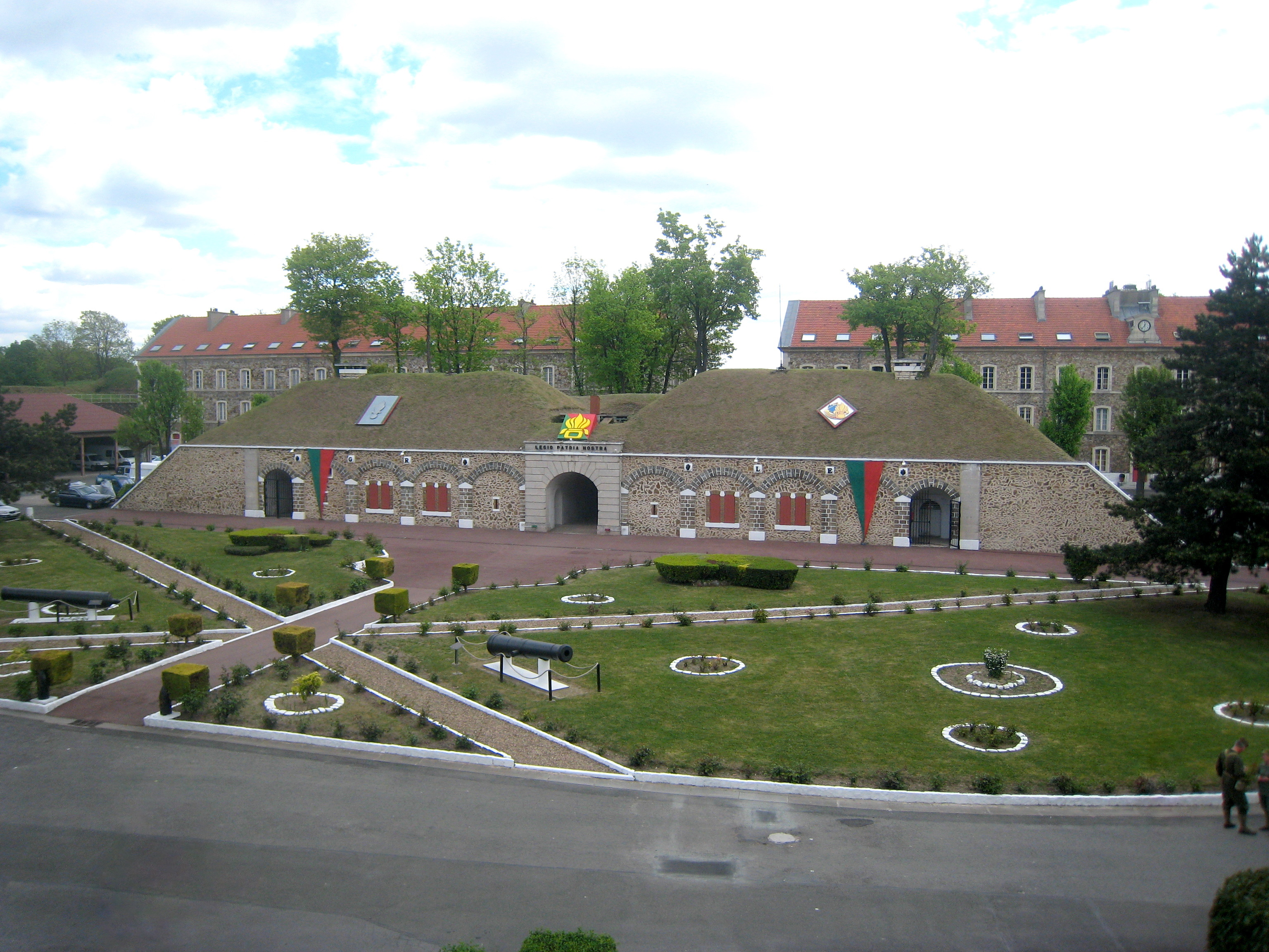 Fort de Nogent à Fontenay sous bois, cour d'honneur